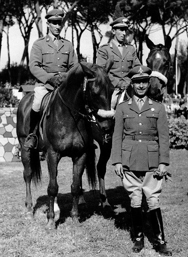 Piero D'Inzeo, Raimondo D'Inzeo and Antonio Gutierrez in Piazza di Siena, Rome - Italy in 1960s